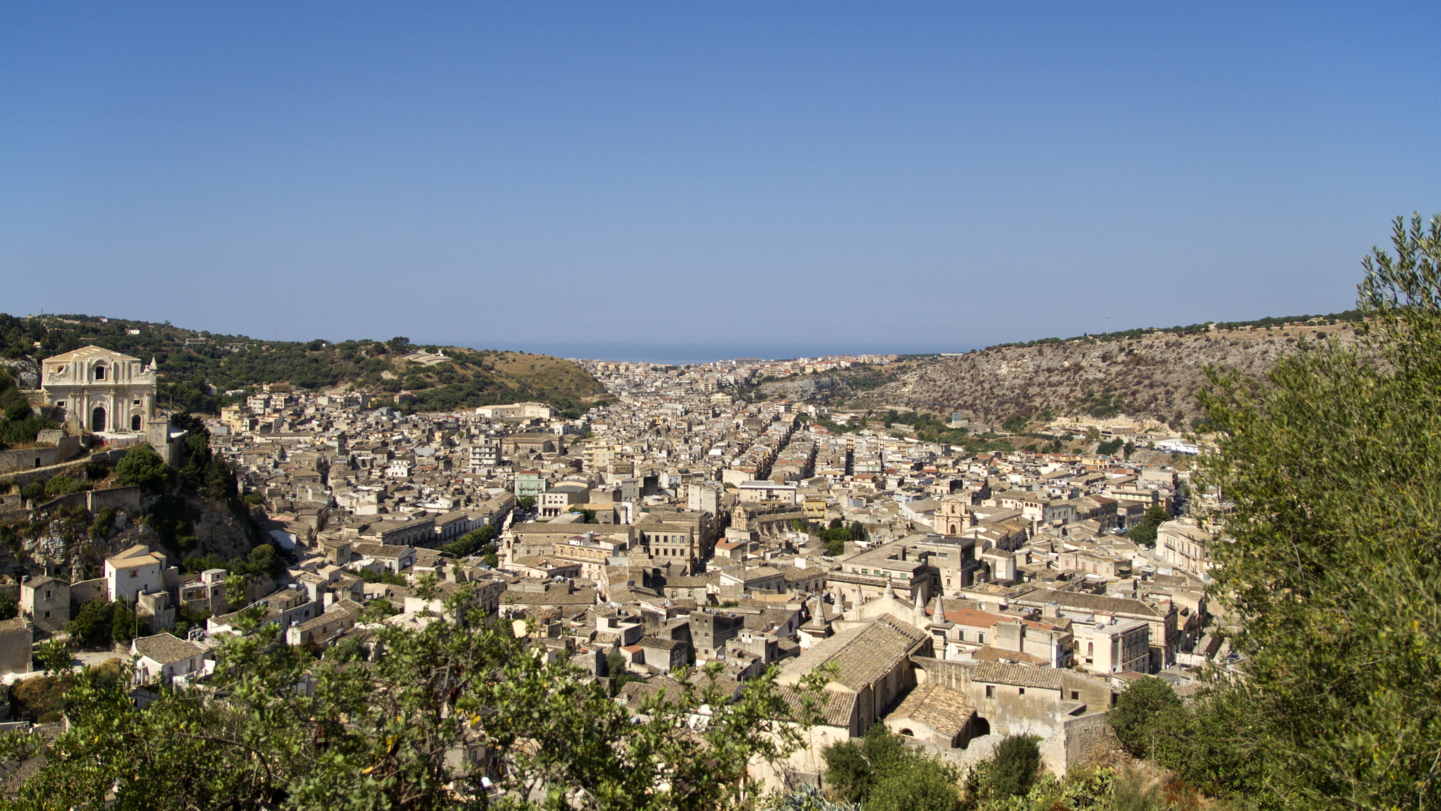 Scicli, Ragusa, Italy